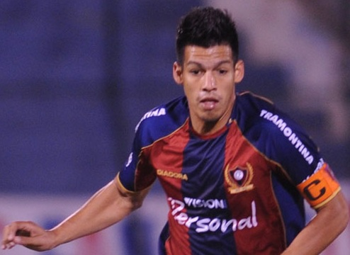 JDosSantos10